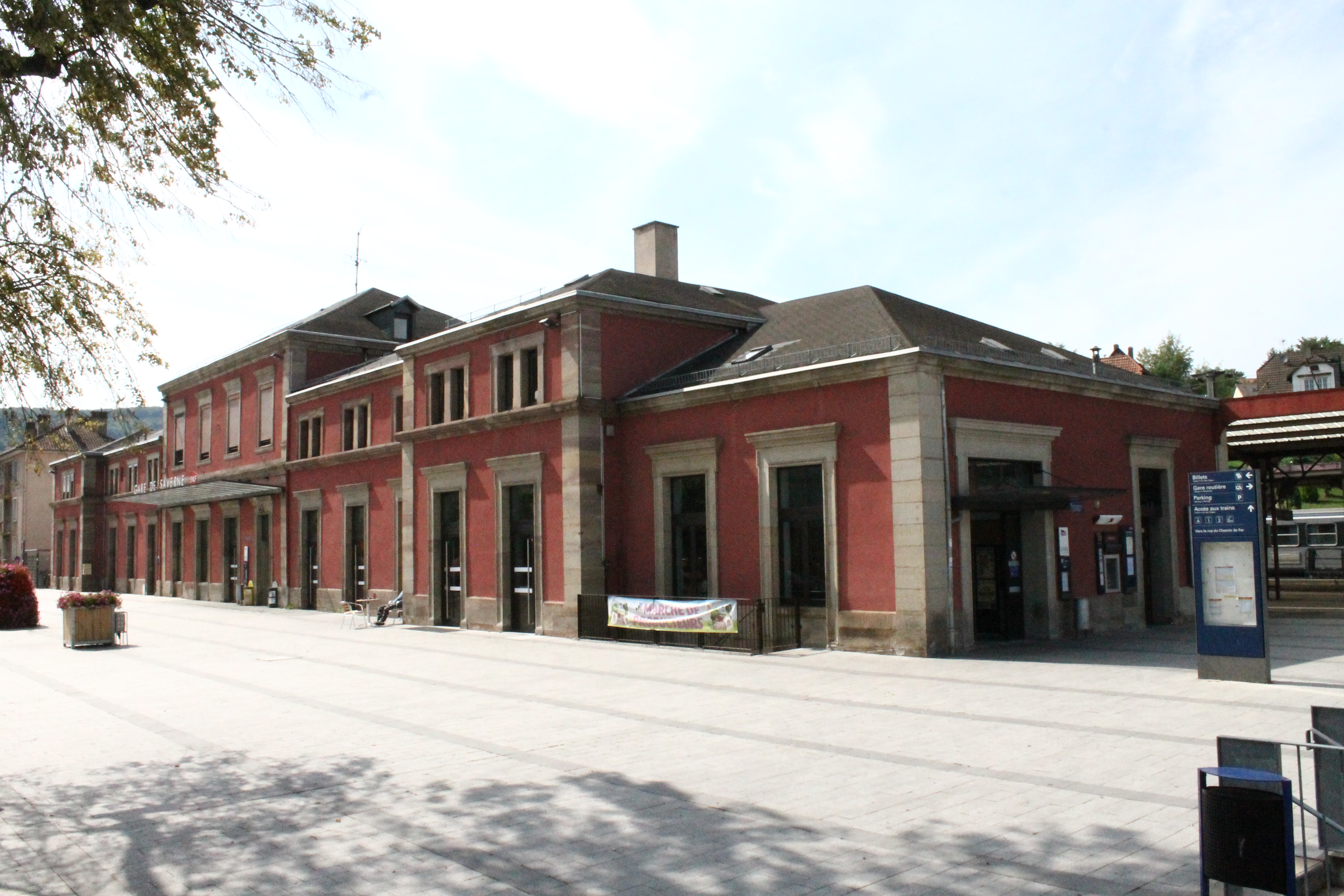 Gare de Saverne, Bas-Rhin, France.